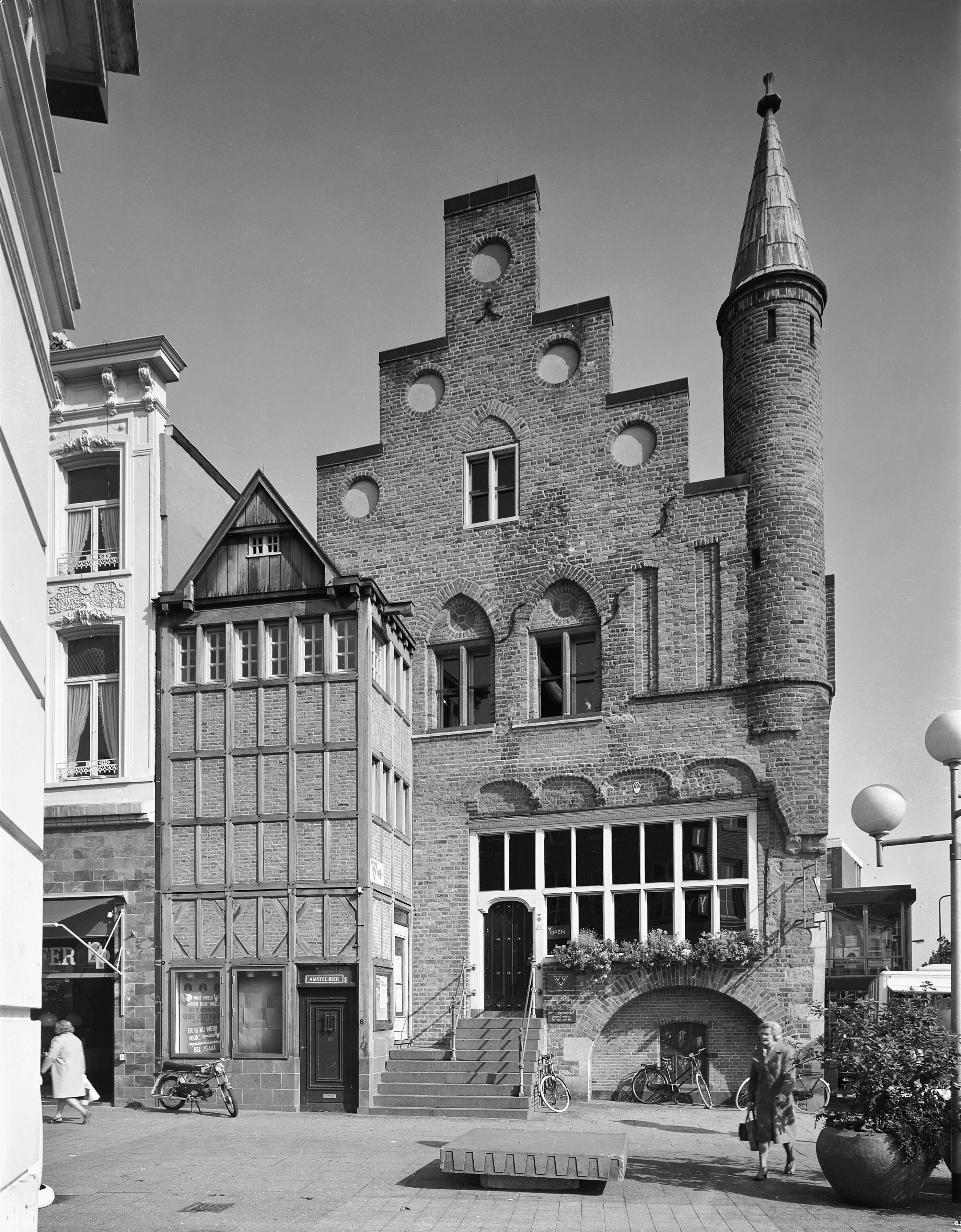 De Moriaan: voorgevel